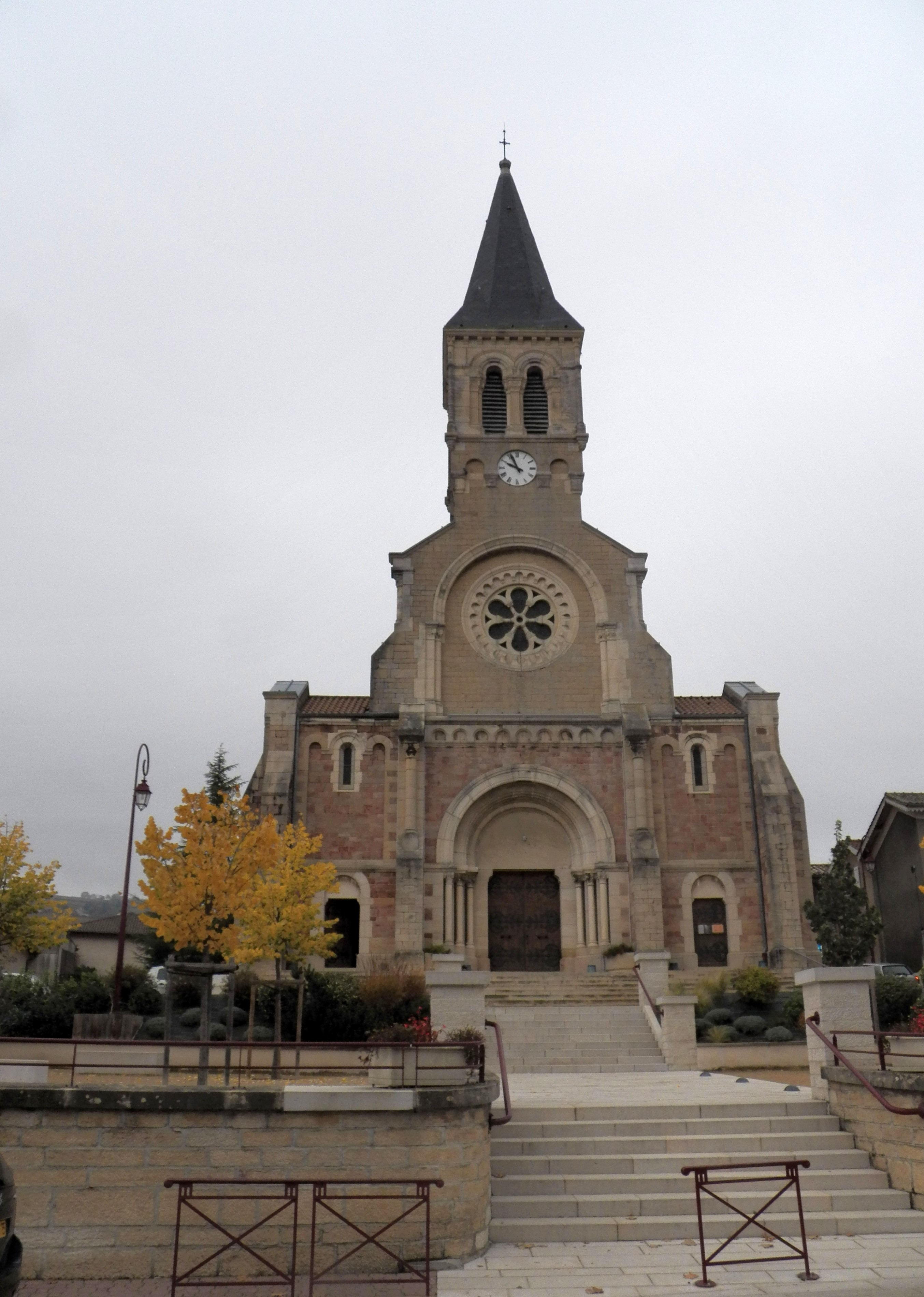 L'église de Julienas (Rho^ne) domine le village.